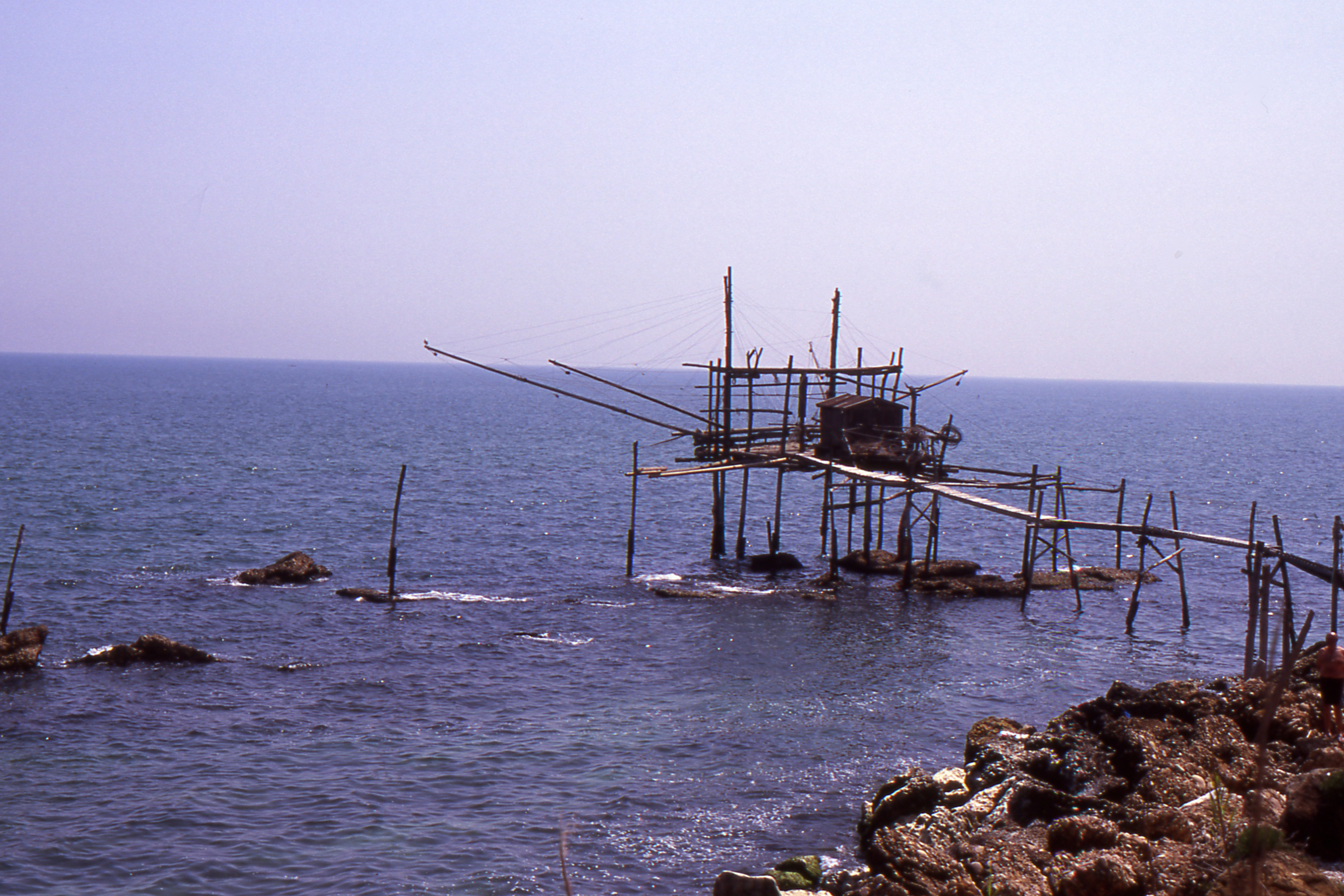 Trabocco situato nei pressi di Marina di San Vito Chietino.